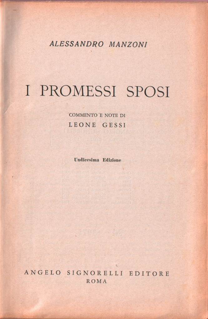 I Promessi Sposi di Alessandro Manzoni con note critiche ed introduzione di Leone Gessi